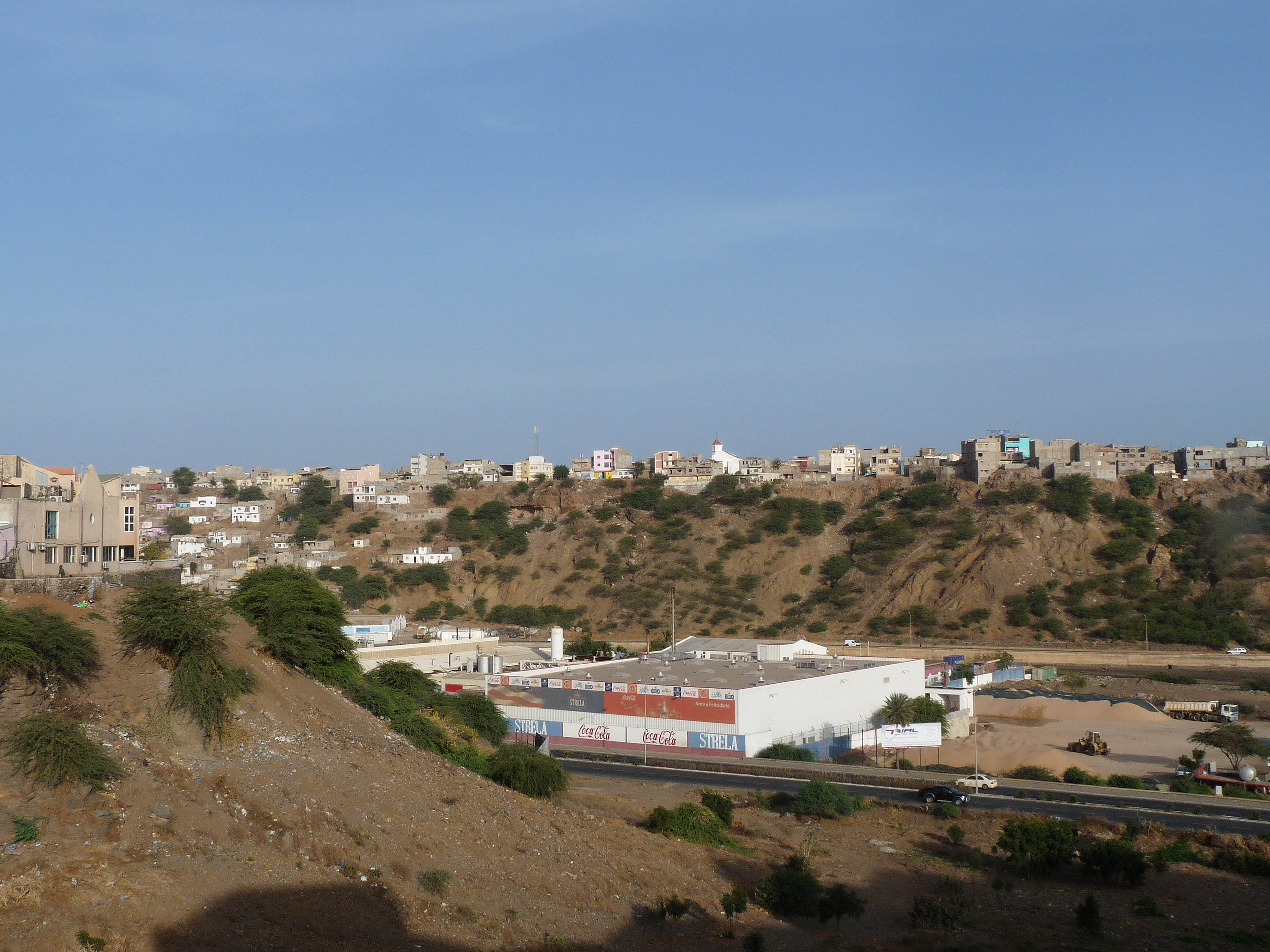 Praia (Cap-Vert) : CERIS-Sociedade Caboverdiana de Cerveja e Refrigerantes